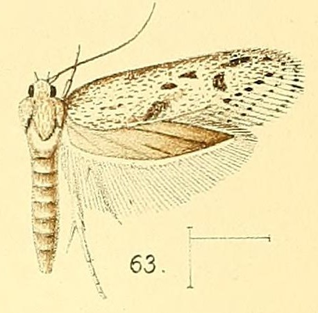 Holcocera irroratella